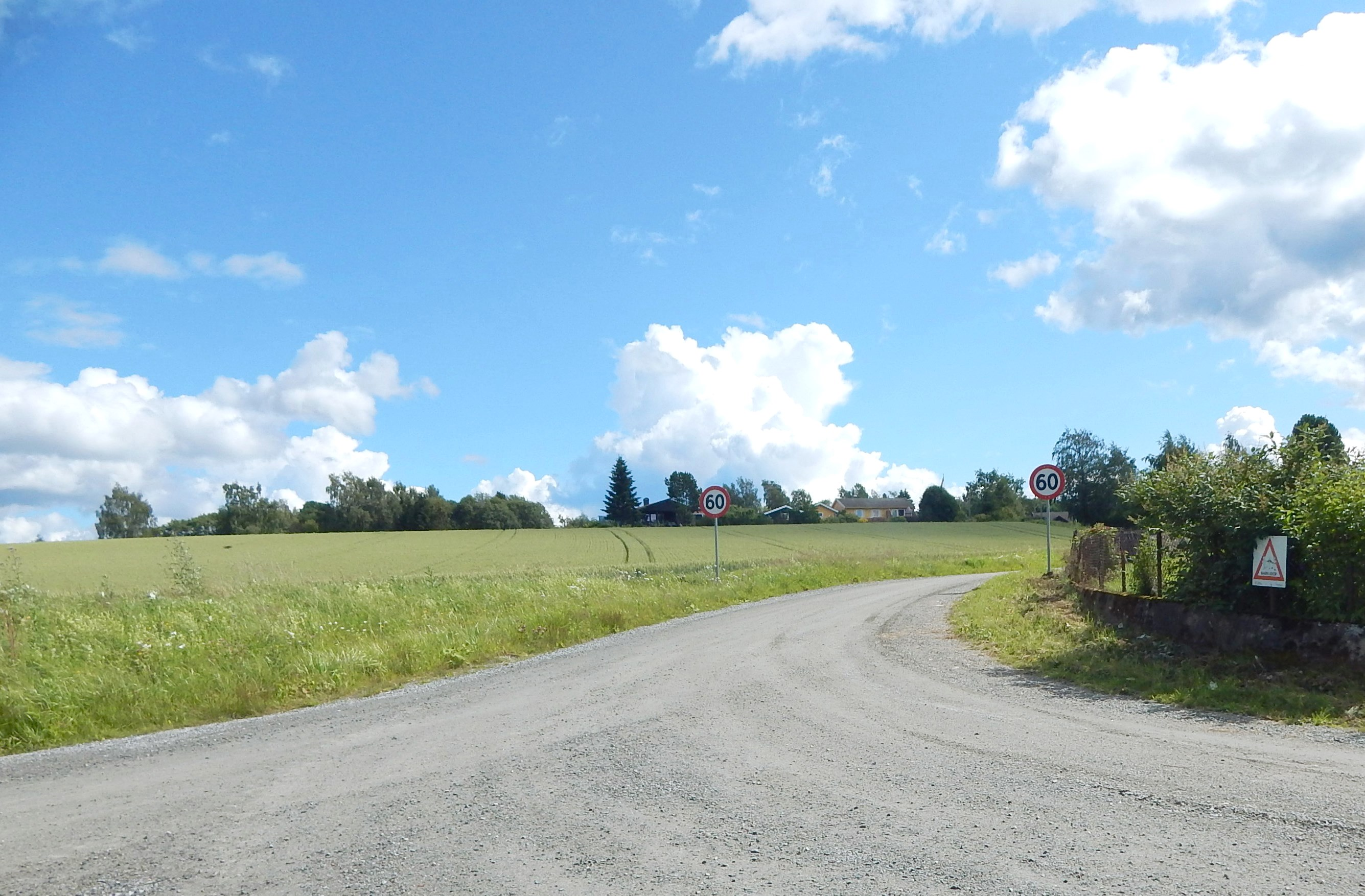 Solheimgutua sett fra Såstadvegen